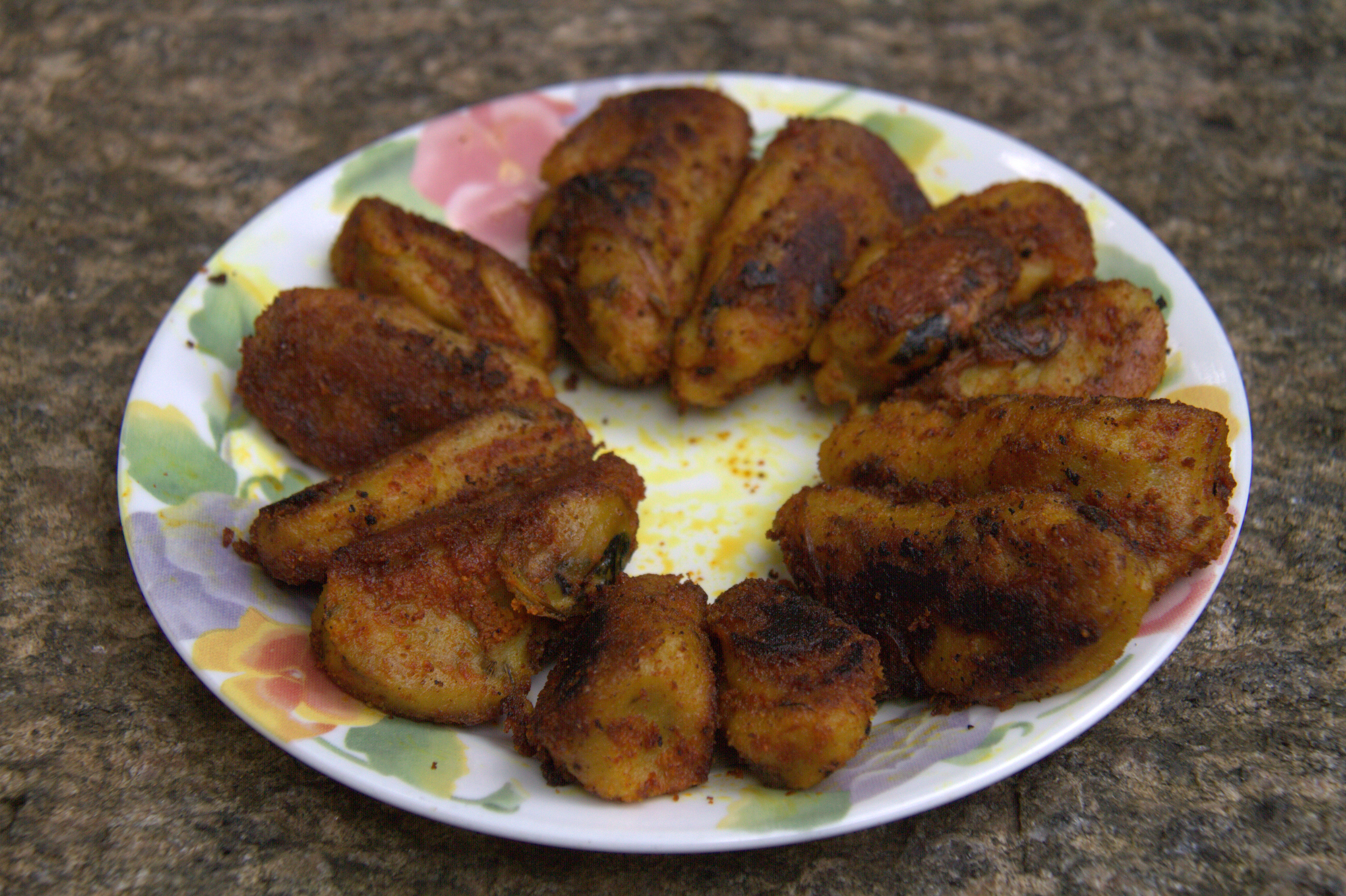 കല്ലുമ്മക്കായ നിറച്ചത്